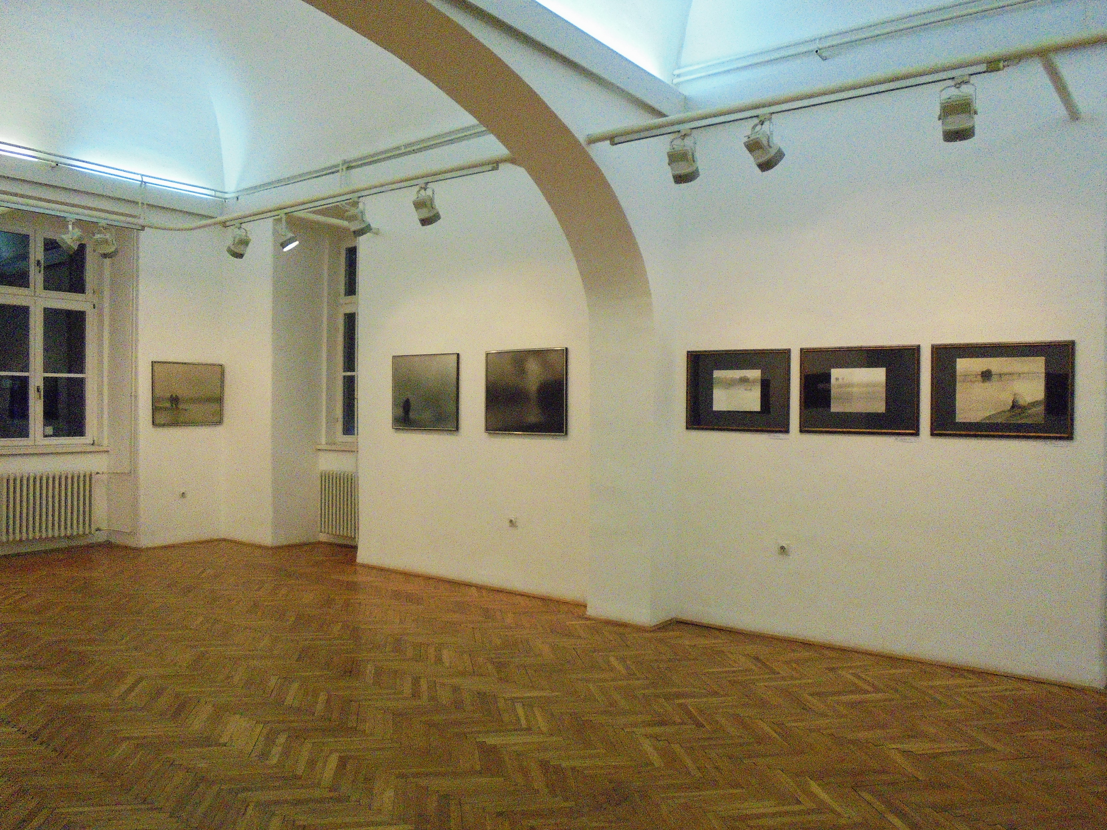 Srpski (latinica): Slike iz legata Zdravka Mandića u Novim Kozarcima, izložene u galeriji Narodnog muzeja Kikinda, jula 2015.